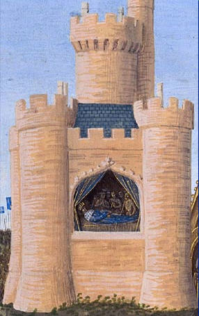 Smrt Ludvíka VIII. 1226